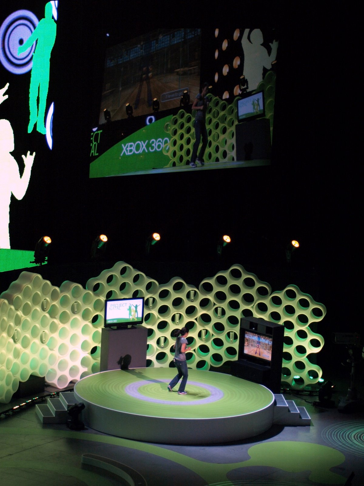 Presentación de Project Natal (posteriormente dado a conocer como Kinect) en el E3 2009, dentro del edificio Galen Center en Los Angeles (EEUU).